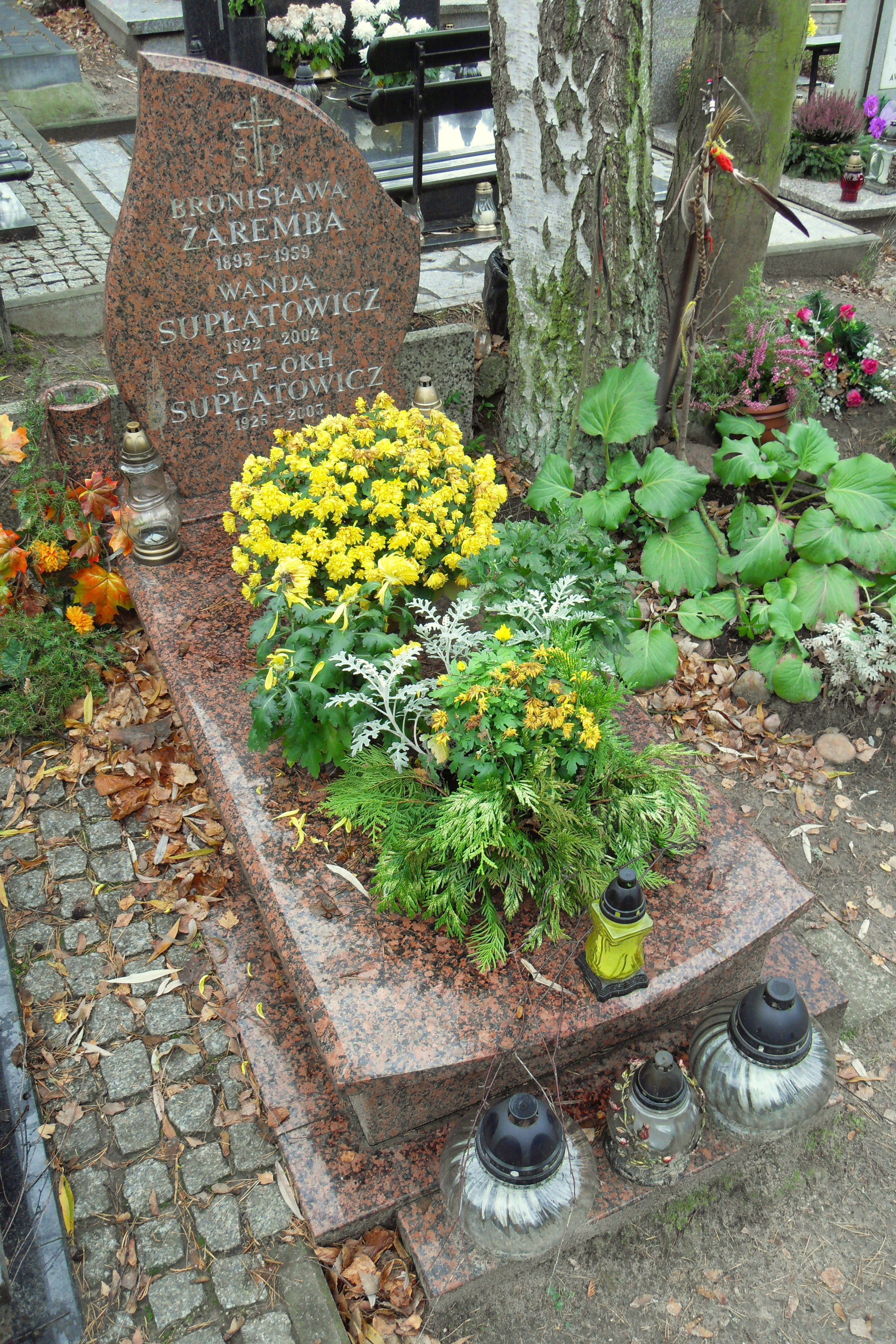 Gdańsk Wrzeszcz Górny. Cmentarz Srebrzysko, grób Stanisława Supłatowicza (Sat-Okh).